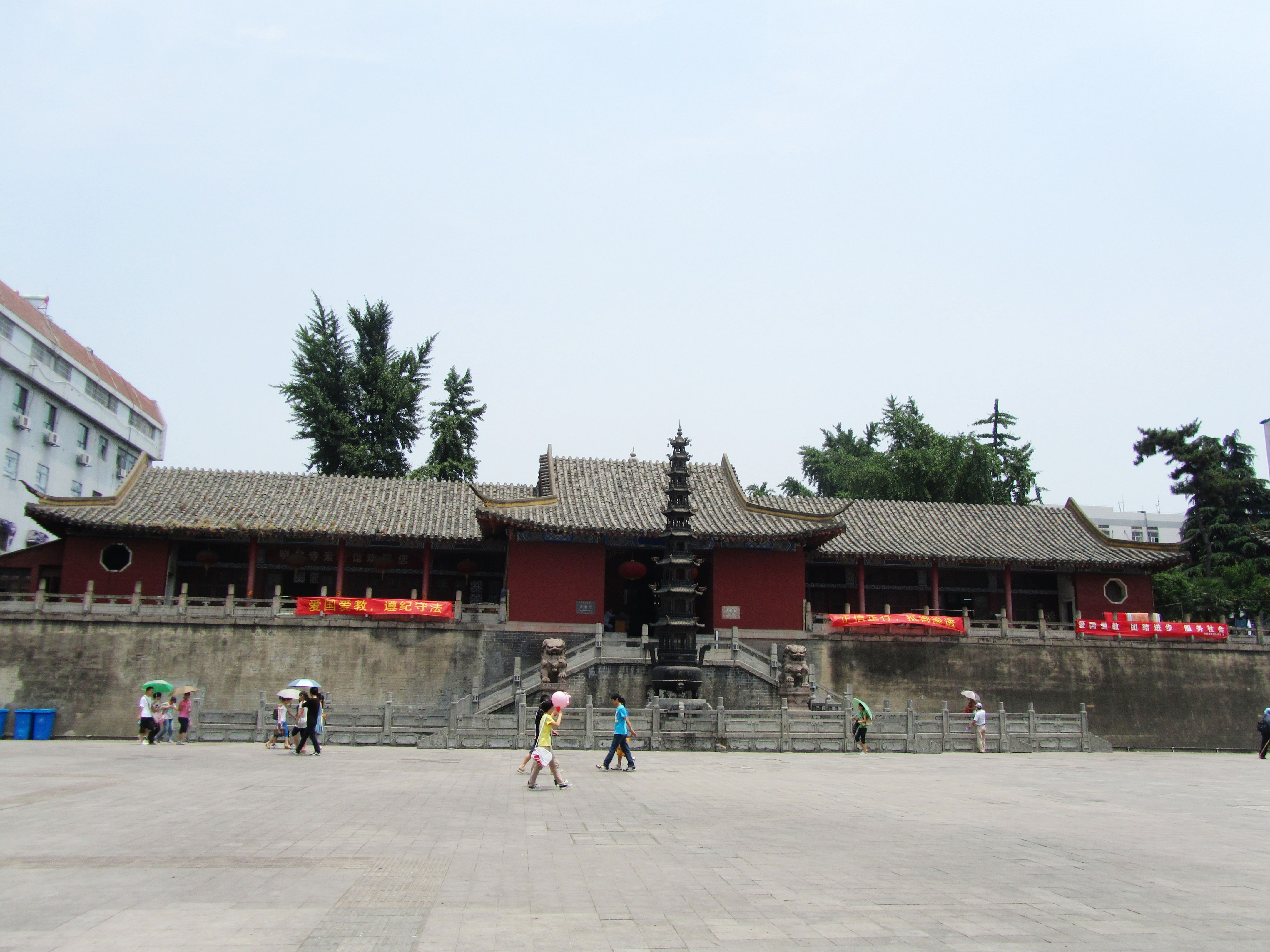 合肥明教寺，正面。